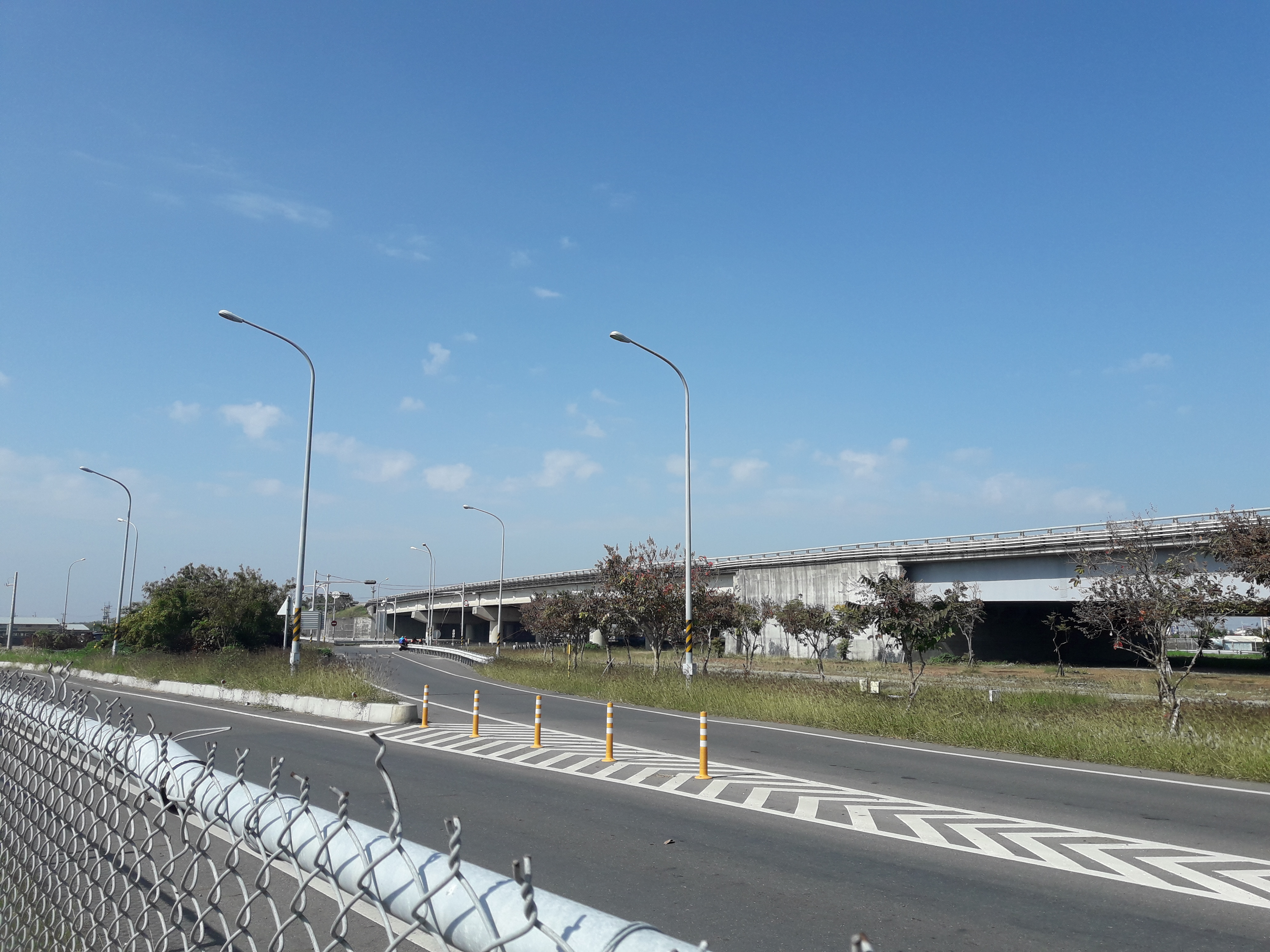 臺78線土庫交流道